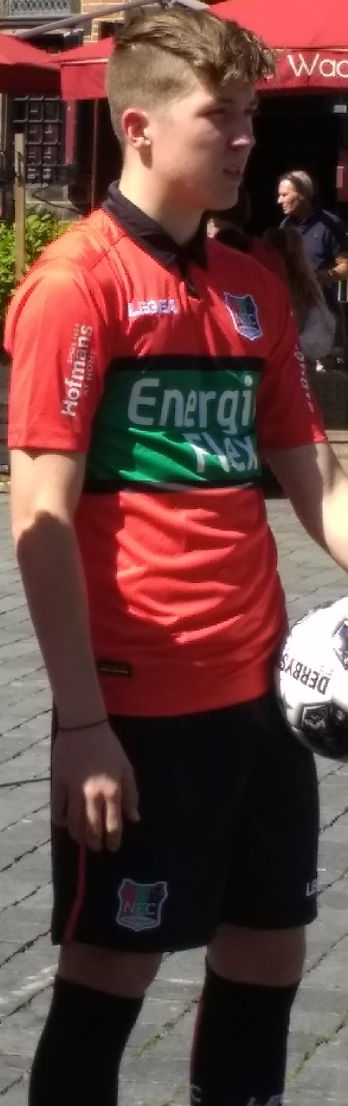 NEC spelers Anass Achahbar en Ole Romeny op de Grote Markt in Nijmegen bij de presentatie van shirtsponsor EnergieFlex en huurling Achahbar.